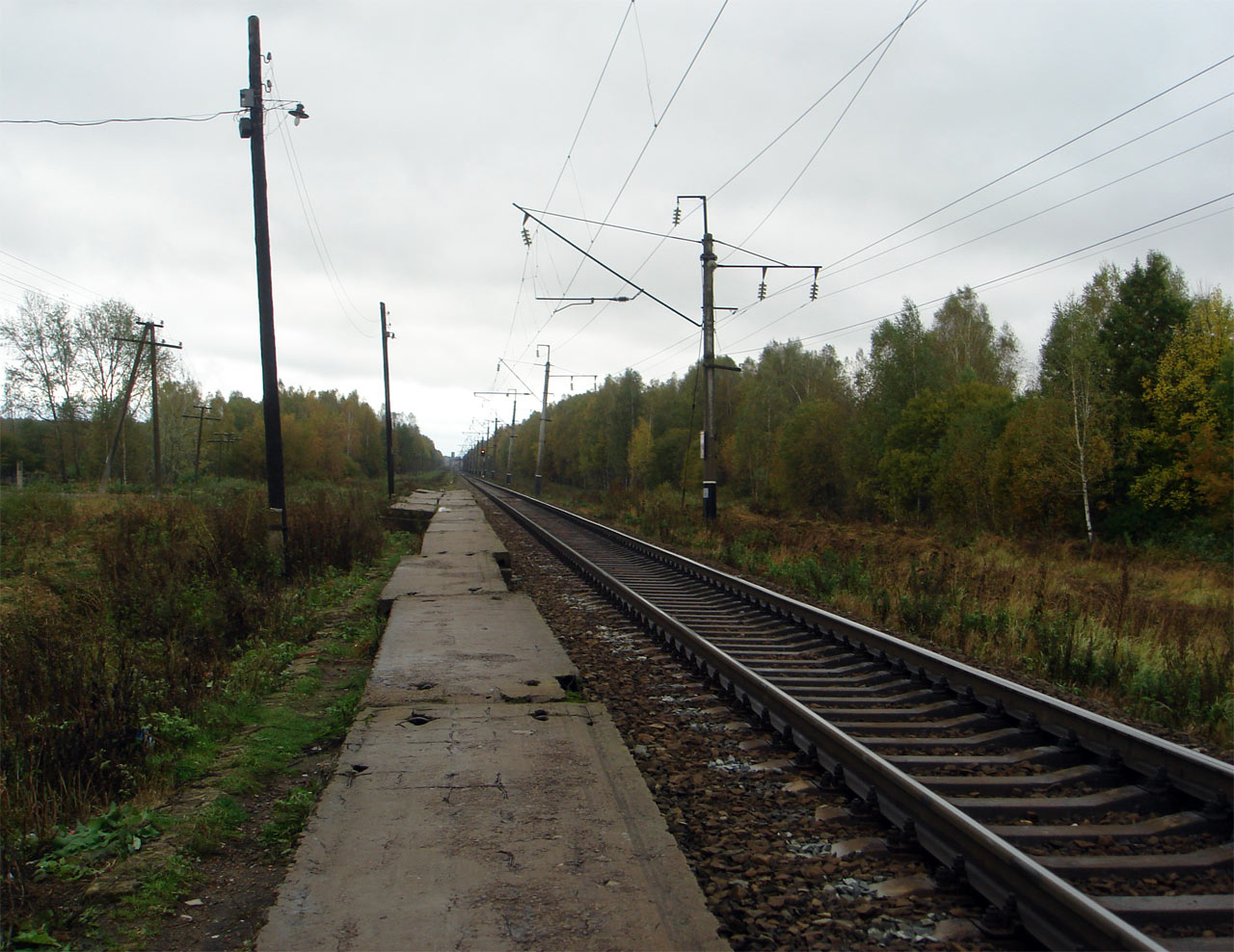 Платформа остановочного пункт «Ломовка», Нижегородская область, Россия.